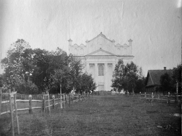 Беларуская (тарашкевіца): Астравец (Astraviec). Касьцёл пры кляштары дамініканаў